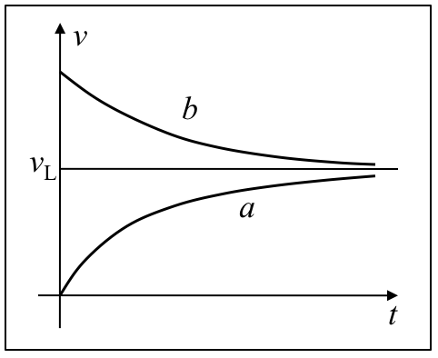 Fluido baten barneangrabitatearen eraginez erortzen ari den gorputzaren abiaduraren eboluzio denbora, muga-abiadurara asintotikoki iristeko.